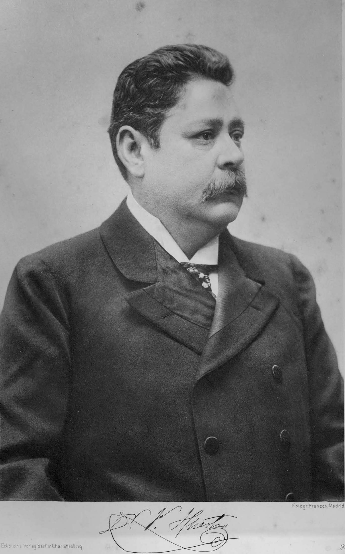 Francisco Huertas Barrero (Alcuéscar, Cáceres, 18 de Diciembre de 1847 - Madrid, 3 de diciembre de 1933) fue un médico español, miembro de la Real Academia de Medicina y senador por designación de la misma. Es considerado como el primer médico que introduce en España la aspirina.